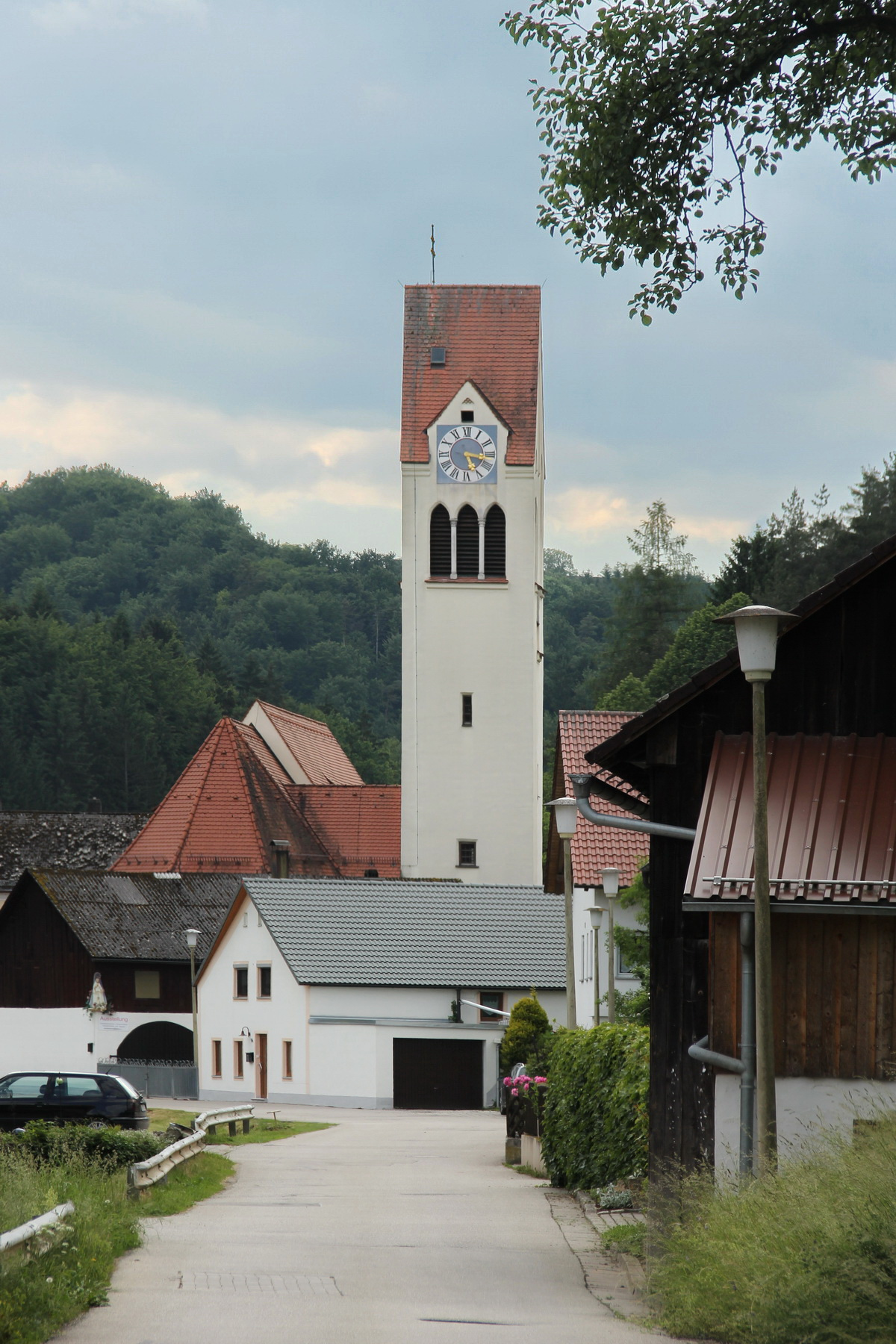 Kloster Altmühlmünster Native nameKloster AltmühlmünsterLocationAltmühlmünster, Riedenburg, Lower Bavaria, GermanyCoordinates48° 58′ 57.36″ N, 11° 37′ 12.36″ E Authority control : Q1774946 institution QS:P195,Q1774946